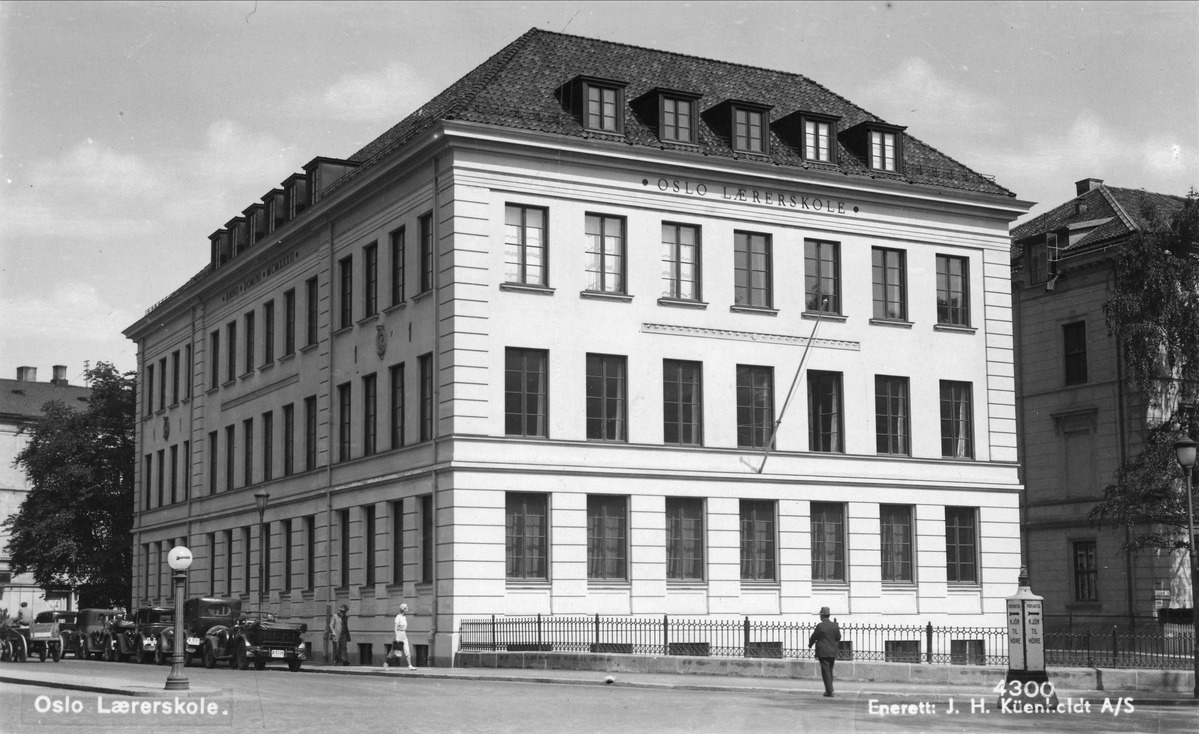 Oslo lærerskole, ca. 1935-1940